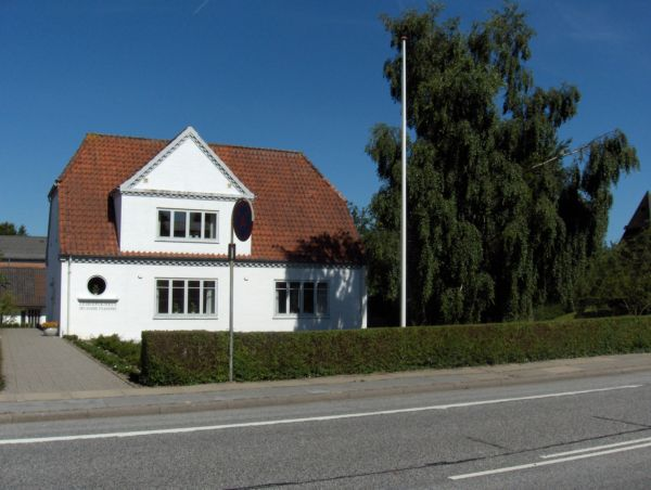 Lejbjerg Kirke i Aalborg